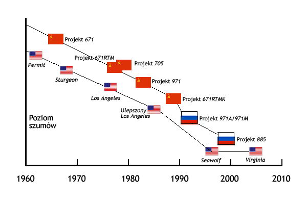 Porównanie charakterystyk akustycznego stealth okrętów amerykańskich i radzieckich